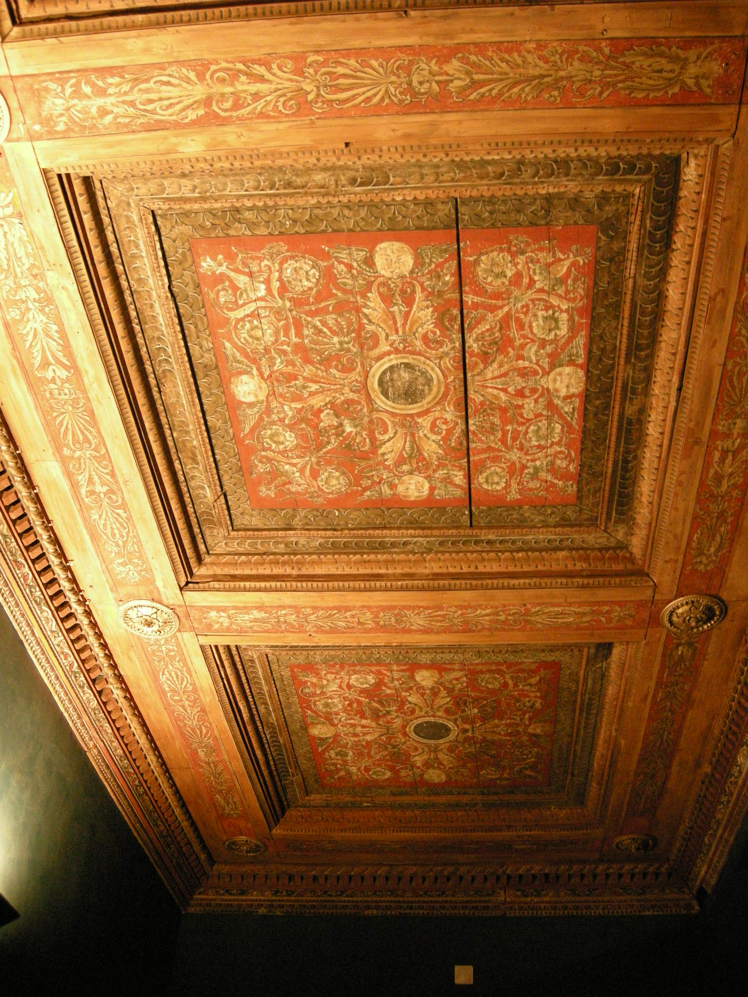 Museo bardini, saletta